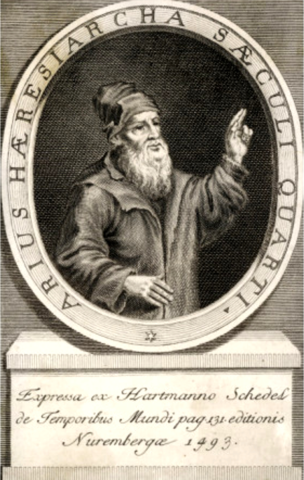 Arius (Areios) (260, Líbia - 336, Konstantinápoly) püspök, az arianizmus tanának szellemi létrehozója.